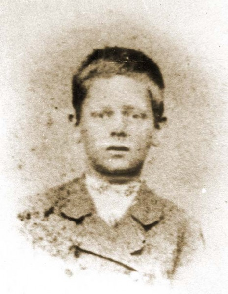 Павел Петрович Бажов, 1889